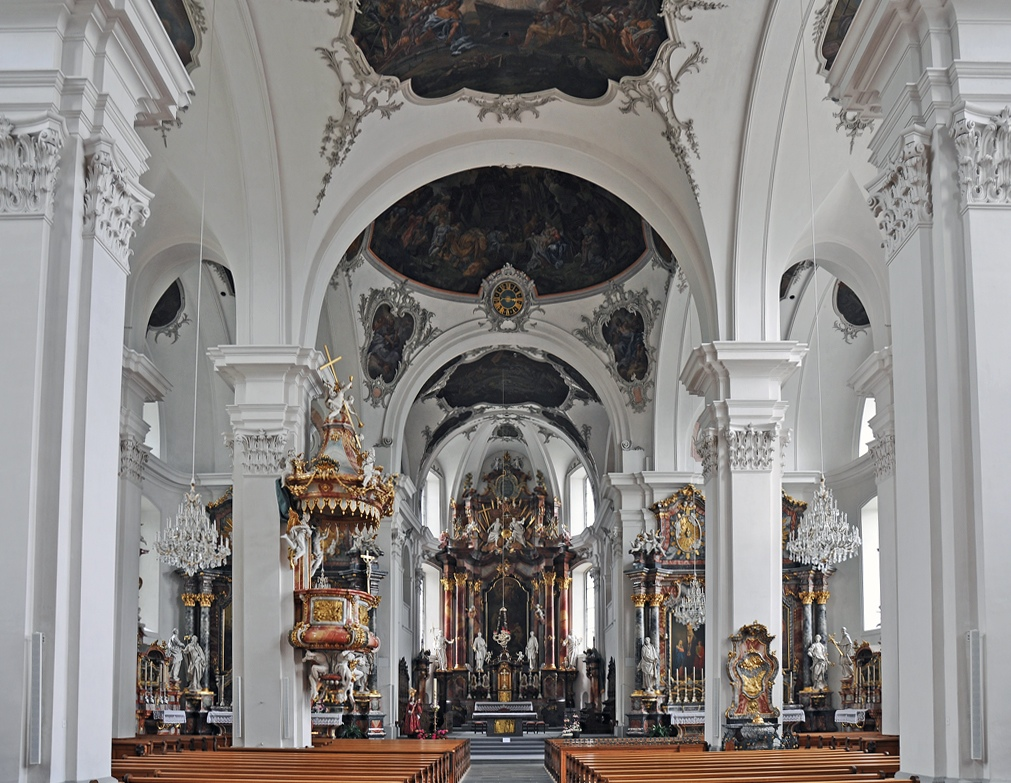 Pfarrkirche St. Martin, Schwyz. Innenansicht